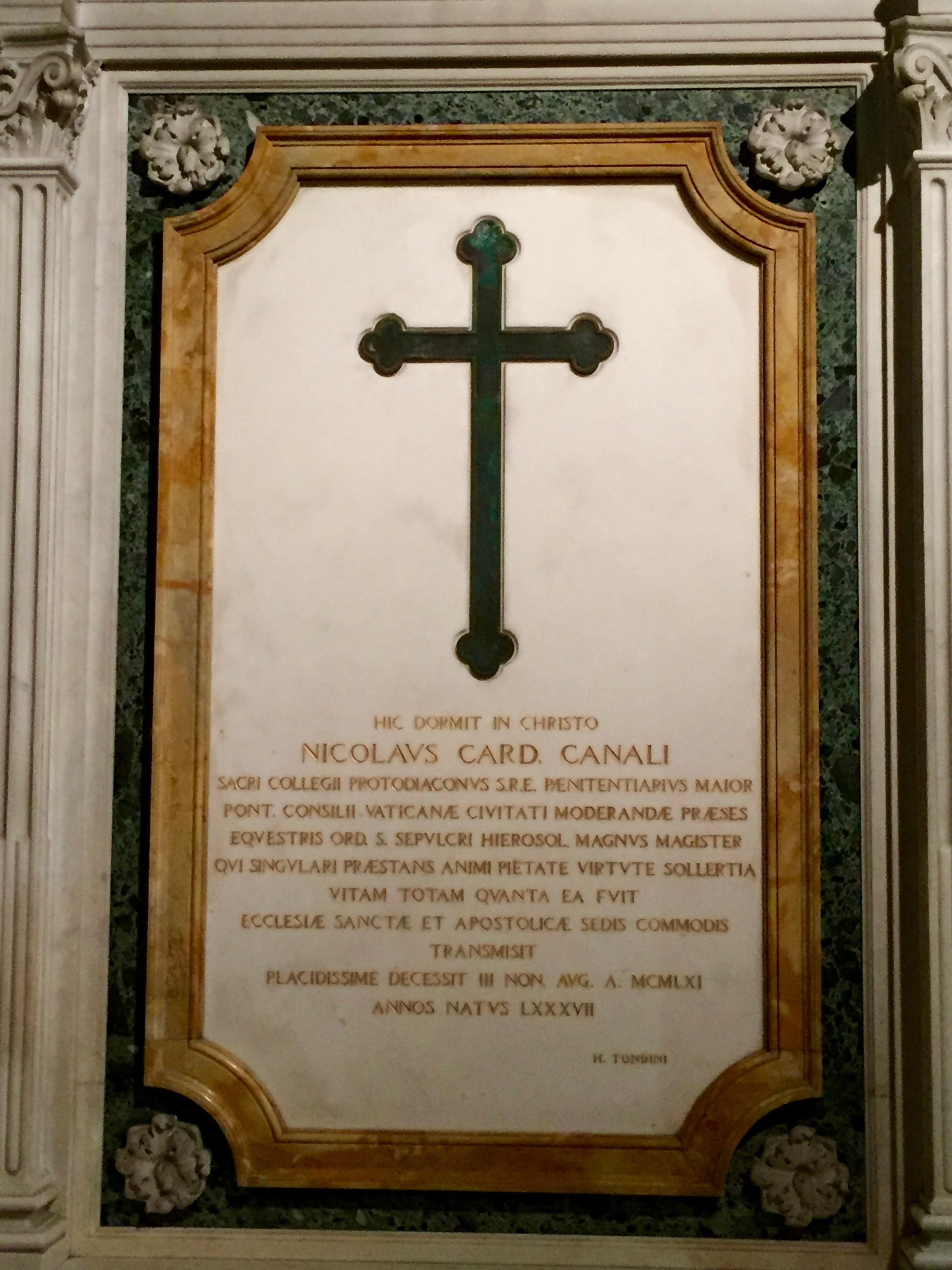 Grabplatte von Nicola Kardinal Canali (1874–1961) in der römischen Kirche Sant'Onofrio al Gianicolo am Verwaltungssitz des Ritterordens vom Heiligen Grab zu Jerusalem